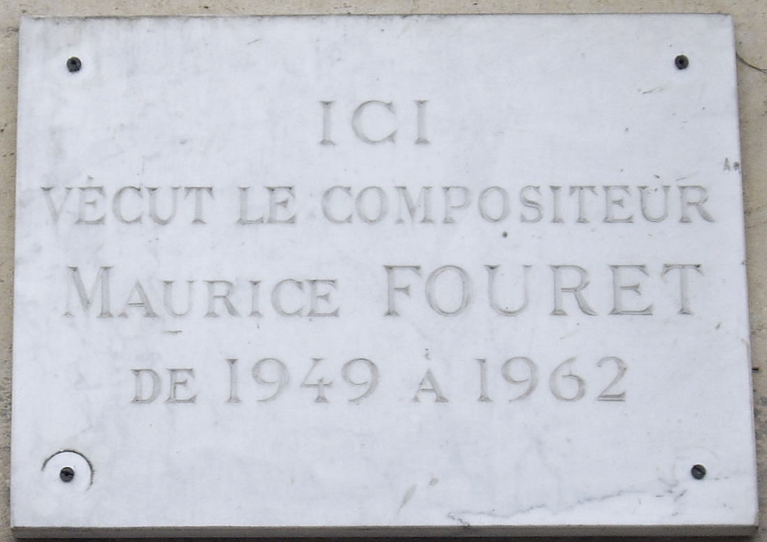 Plaque commémorative, 15 bis boulevard Jules-Sandeau, Paris 16e. « Ici vécut le compositeur Maurice Fouret de 1949 à 1962. »